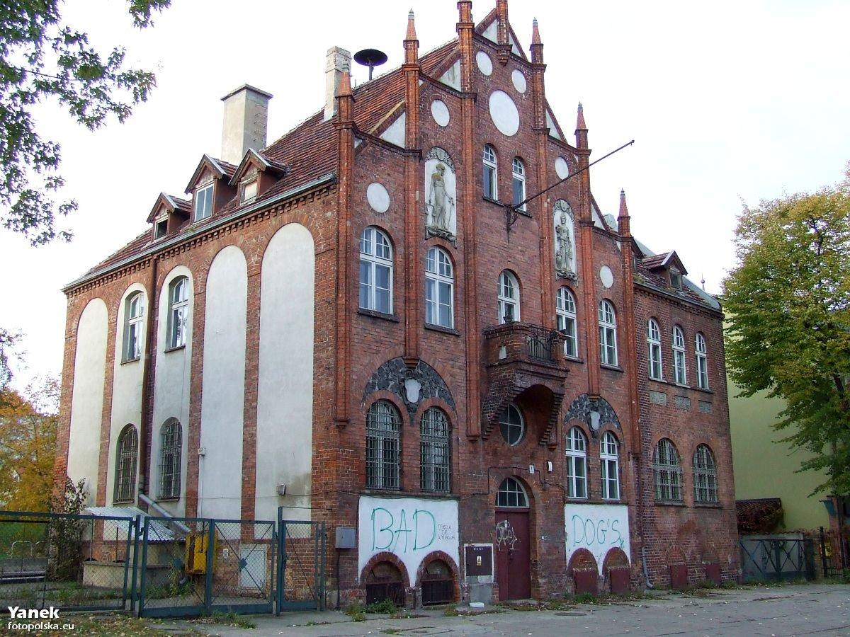 Widok na d. ratusz i d. komisariat Policji a wcześniej MO.